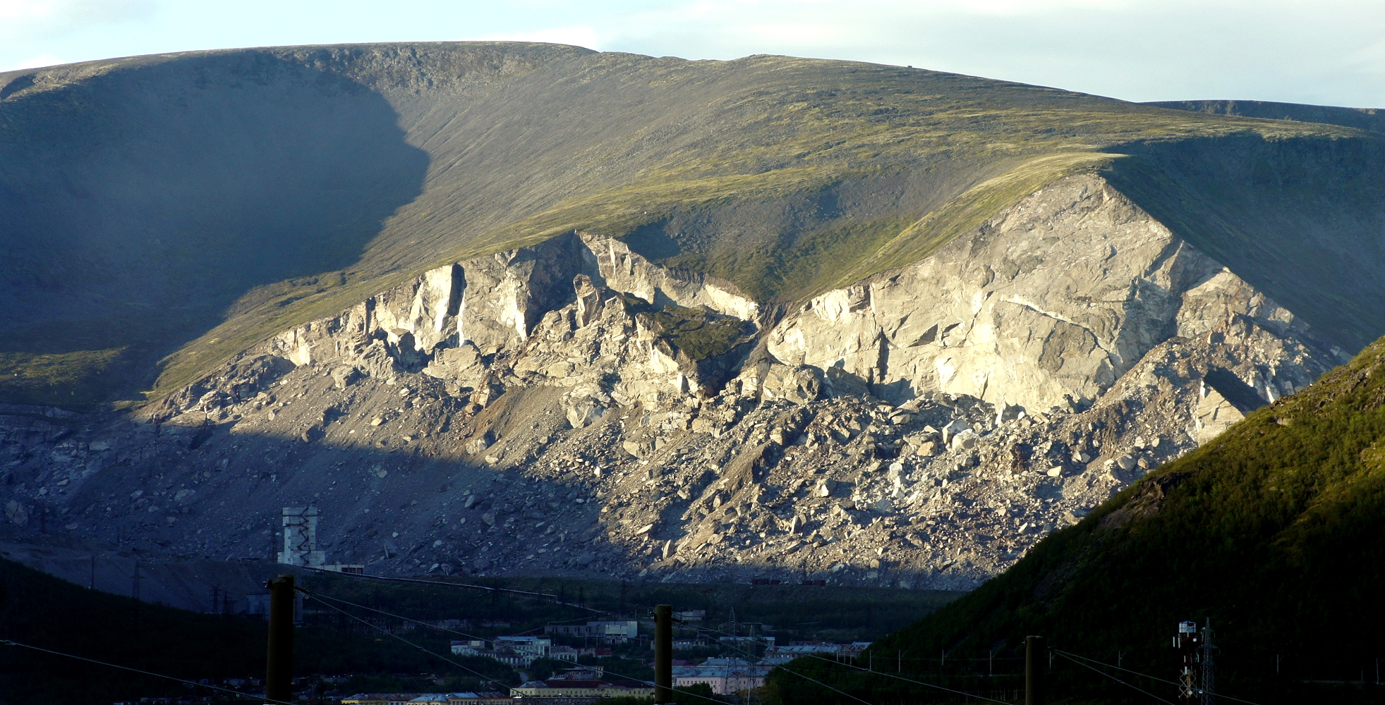 Добыча апатита в Хибинах. Отвалы Северного карьера в долине реки Ворткеуай, склон отрога горы Кукисвумчорр